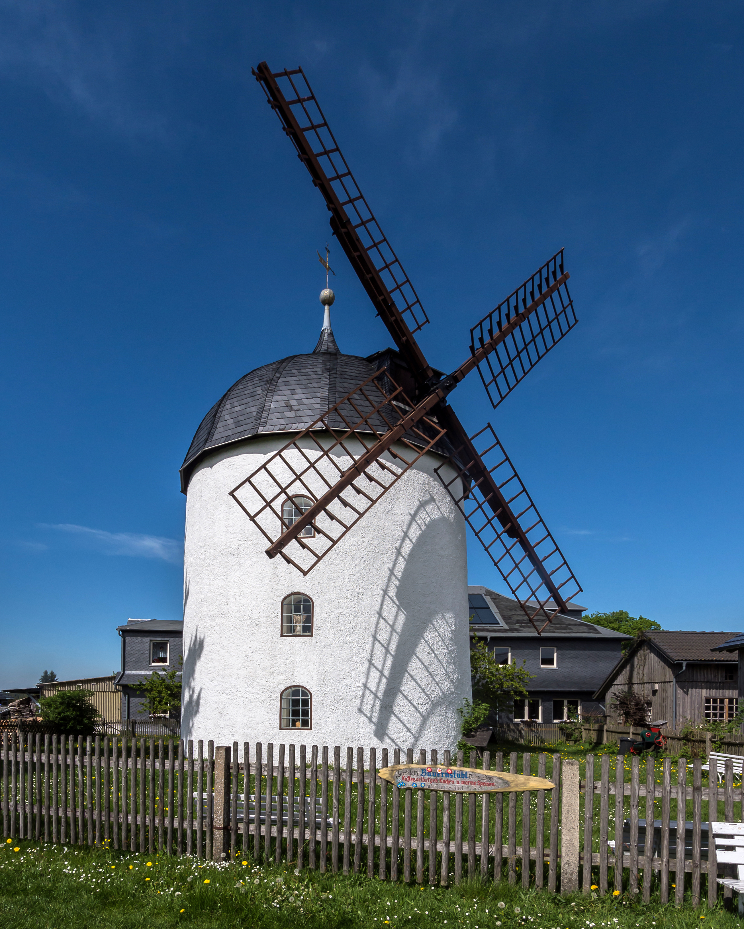 Dittrichshütte An der Windmühle 2 Windmühle